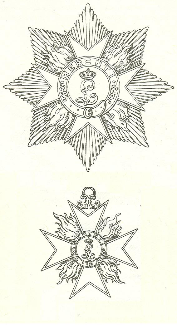 Tekening van ster en juweel van de Militaire Orde van Verdienste van Beieren.